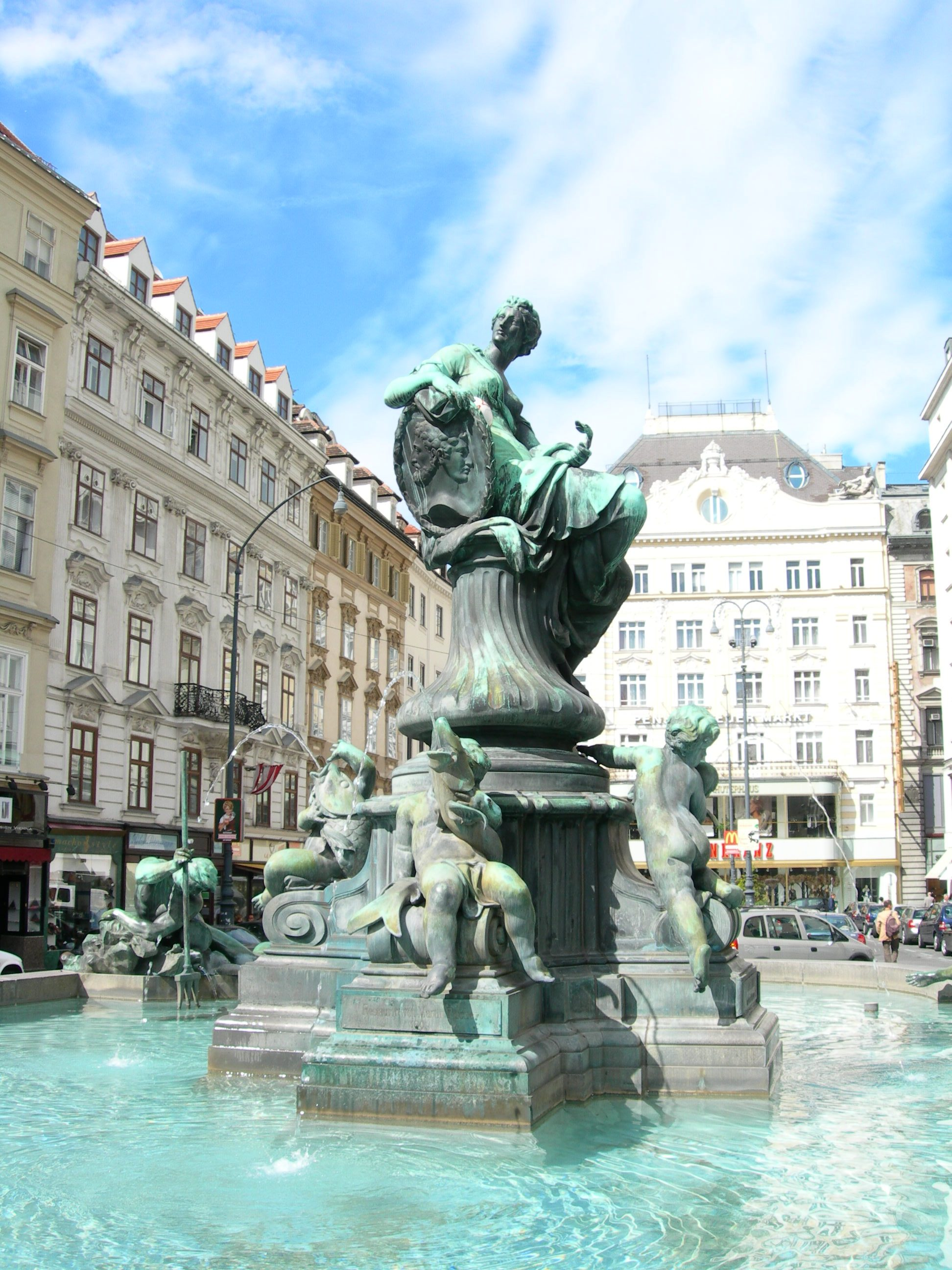 Donnerbrunnen at the Neuer Markt in Vienna